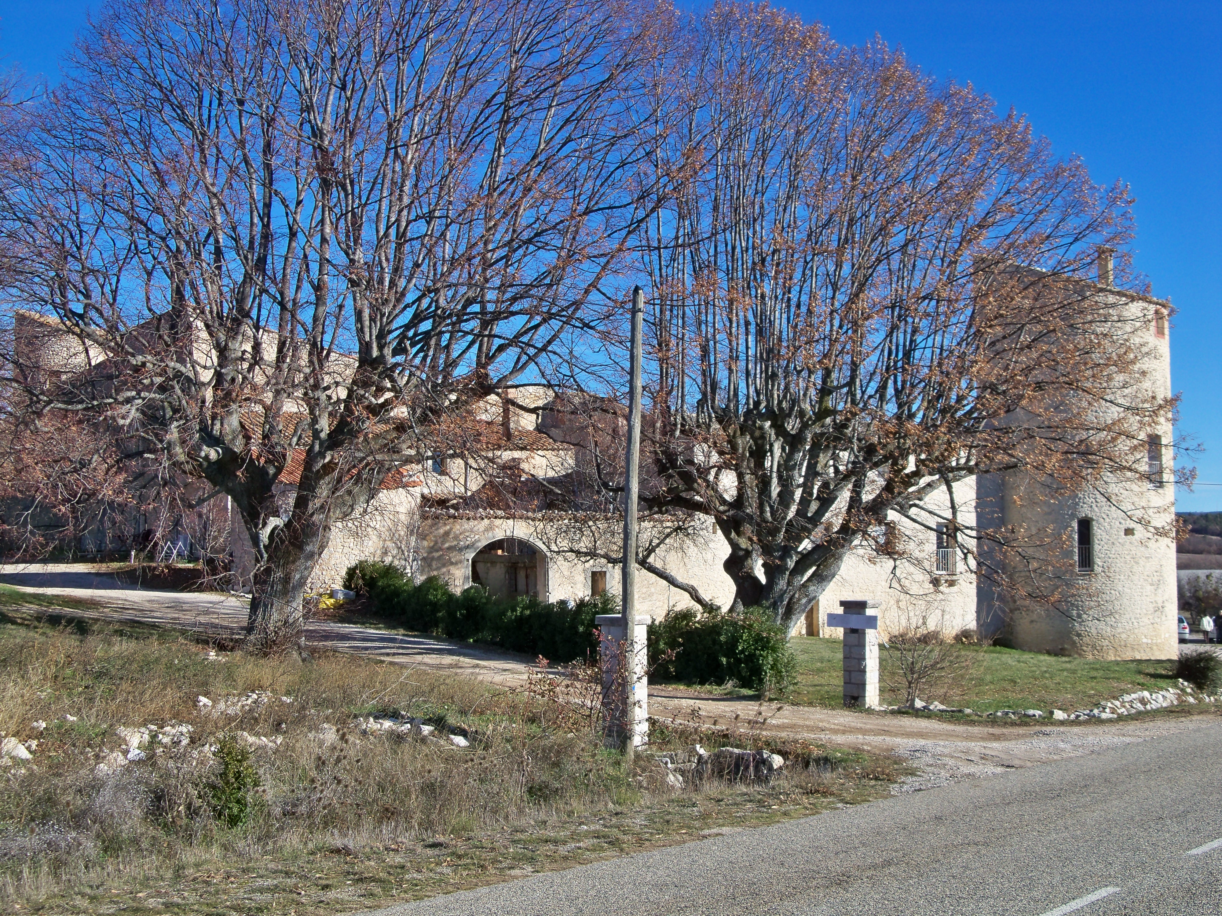 Chateau de la Gabelle (Ferrassières)